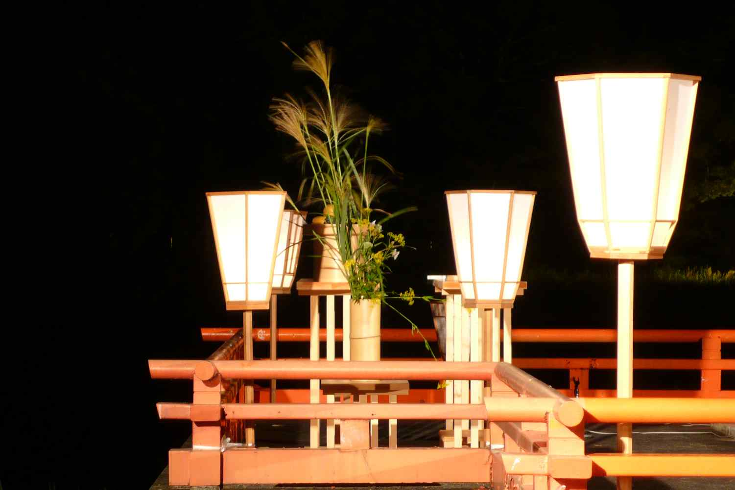 Aki no nanakusa at Ise shrine (Geku)